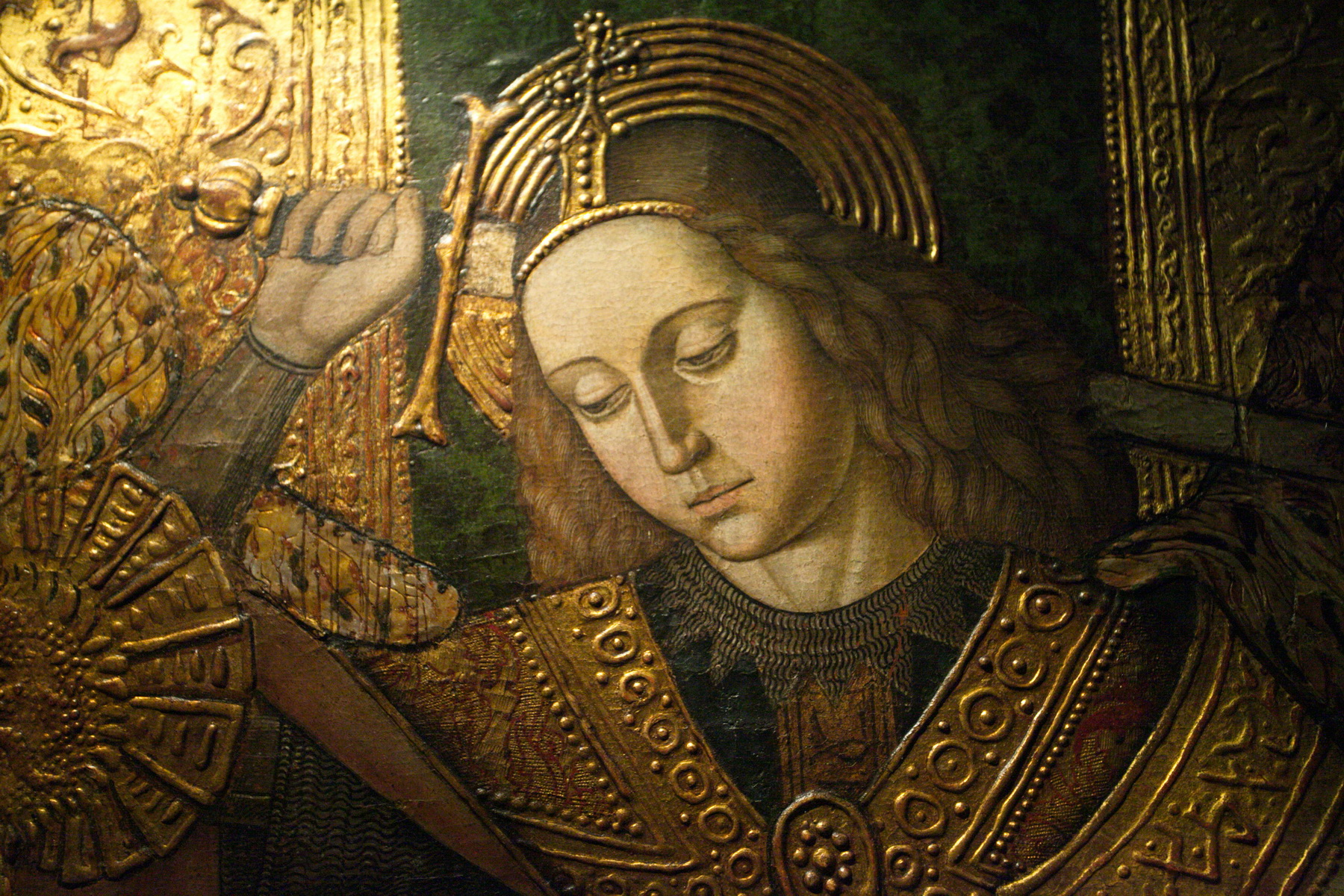 Detall de Sant Miquel del retaule de Castelsardo, obra del mestre de Castelsardo (1492). Catedral de Castelsardo (Sardenya)